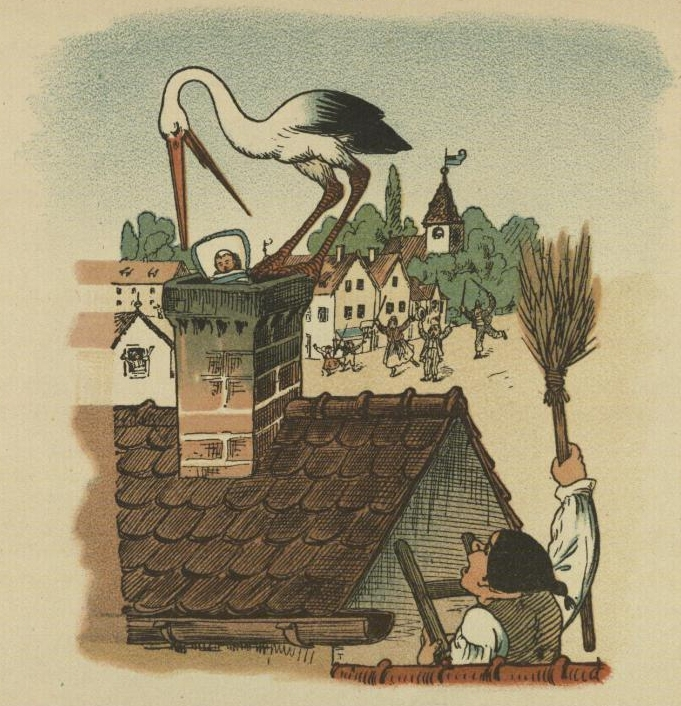 Das Buch vom Klapperstorch für Jung und Alt zur Unterhaltung und Belehrung. 2. Auflage. Dessau: Barth